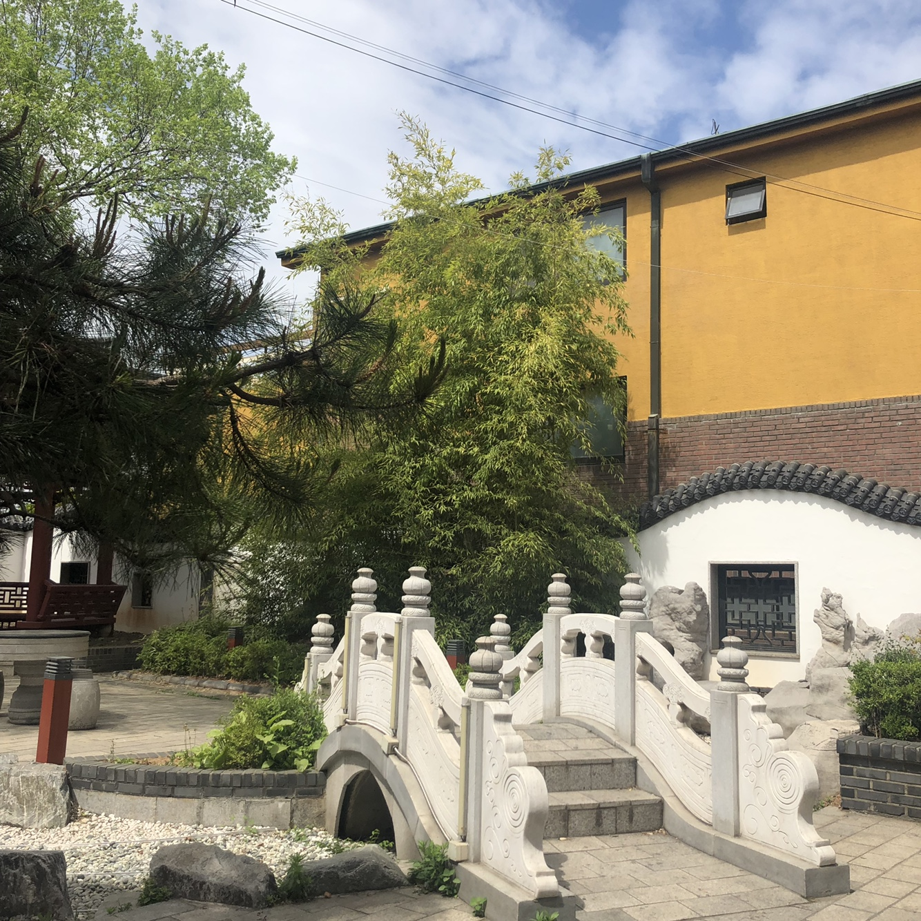 인천 차이나타운에 있는 한중일 쉼터